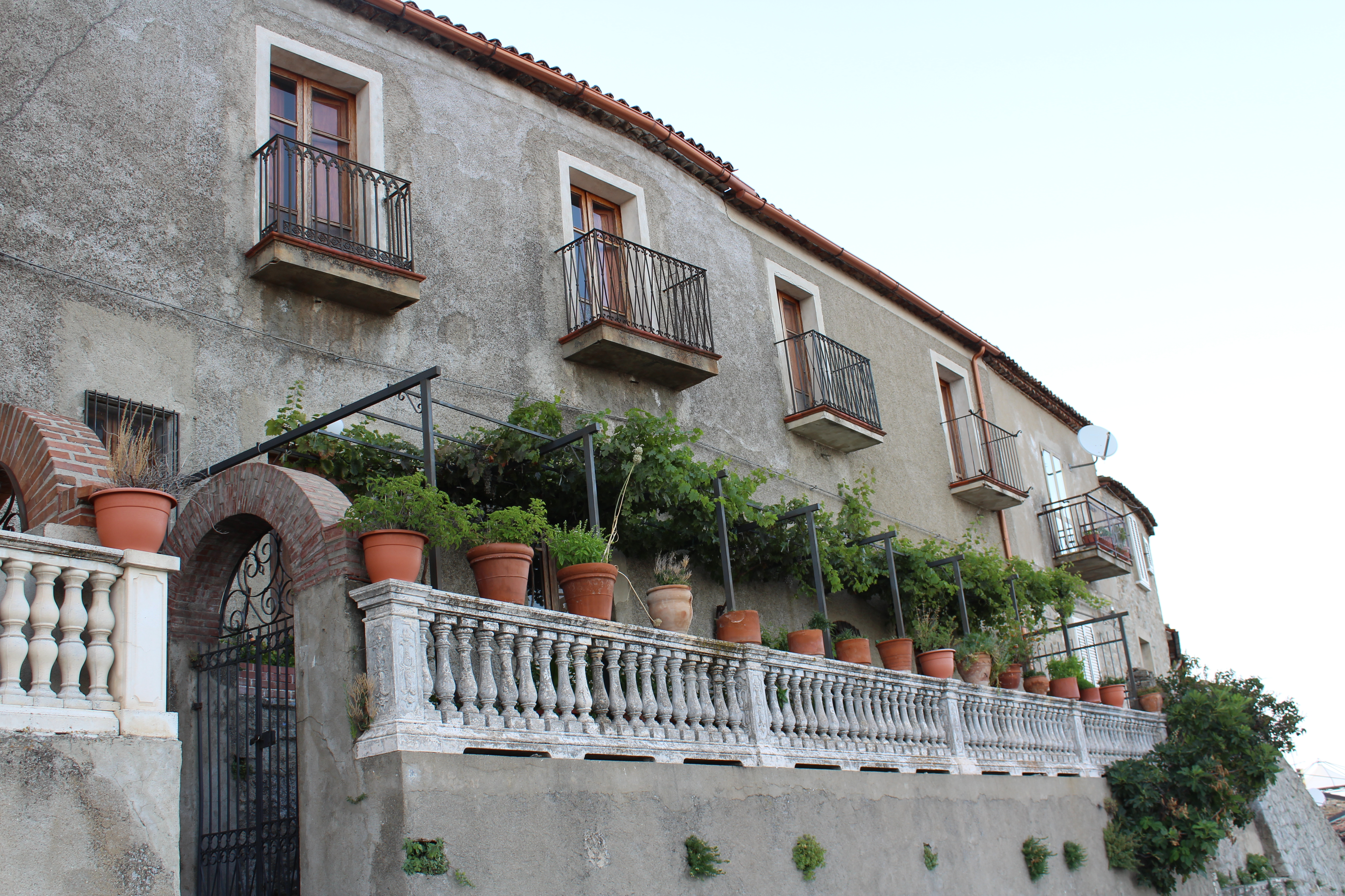 Palazzo signorile della famiglia Mele.